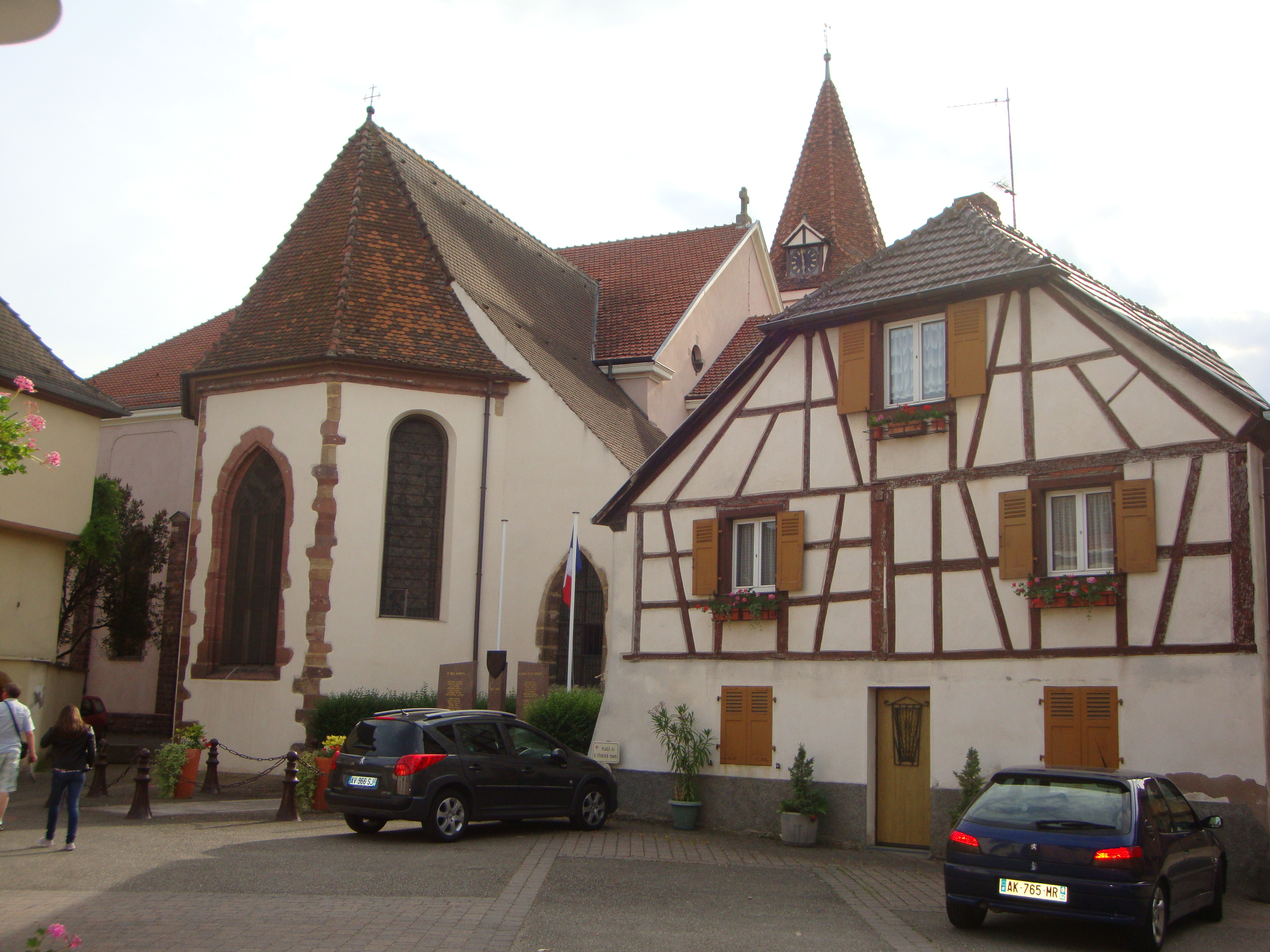 Herrlisheim (68)